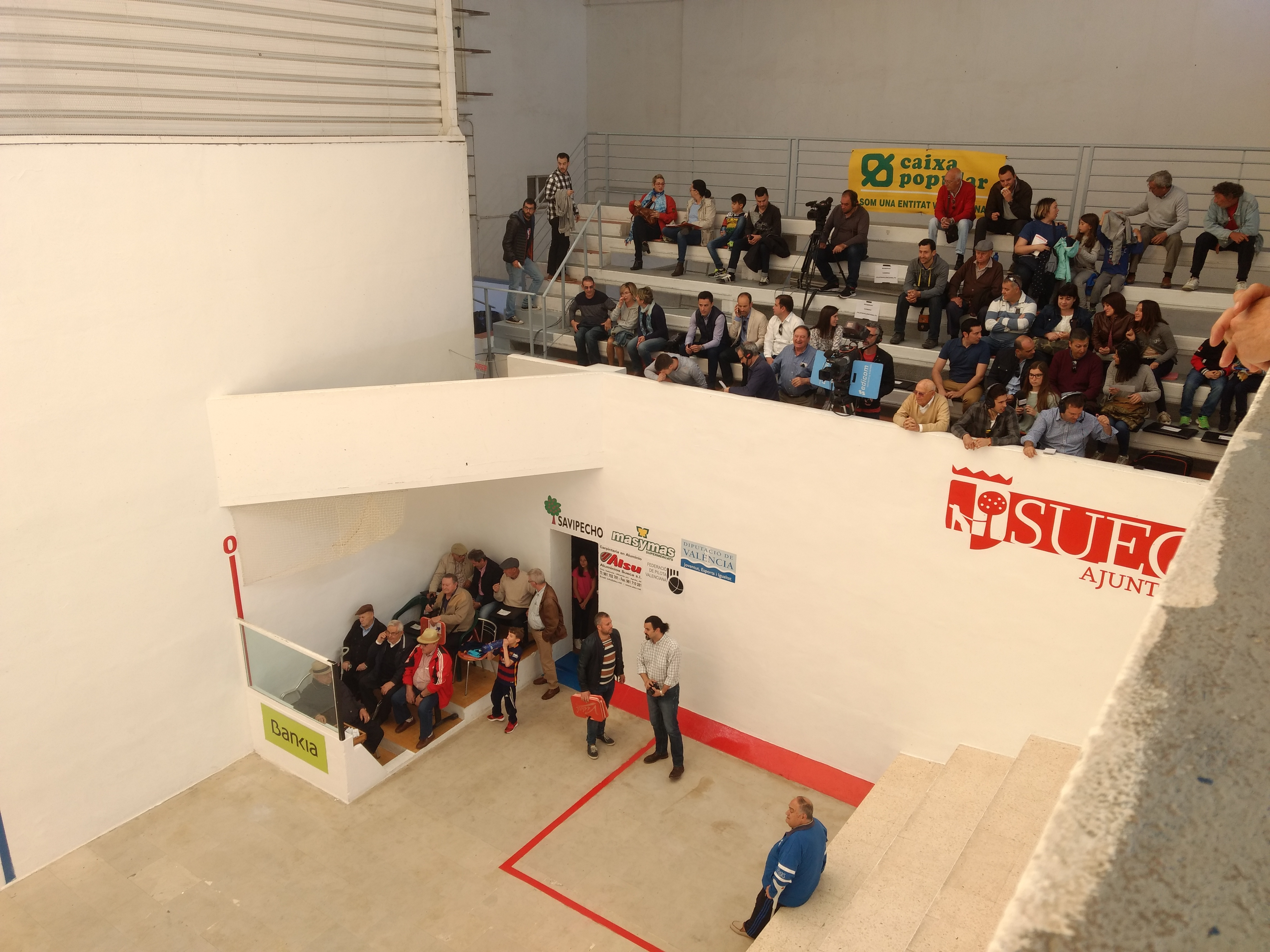 Trinquet Eusebio de Sueca durant la primera partida de la final. El trinquet des de la Galeria de l'escala.